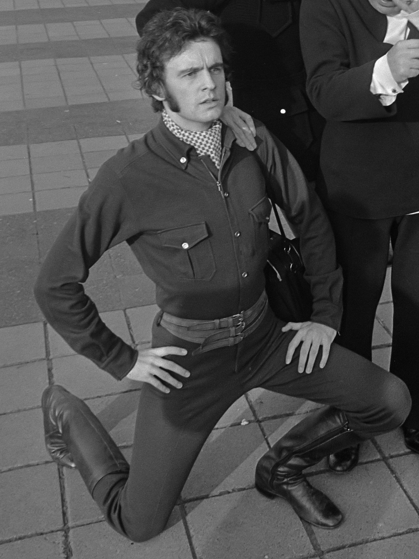 Beroemde modeontwerpers waren aanwezig zijn P. en C. modeshow 100-jarig bestaan in RAI. Herrgard, Gilbey, Esterel 15 oktober 1969